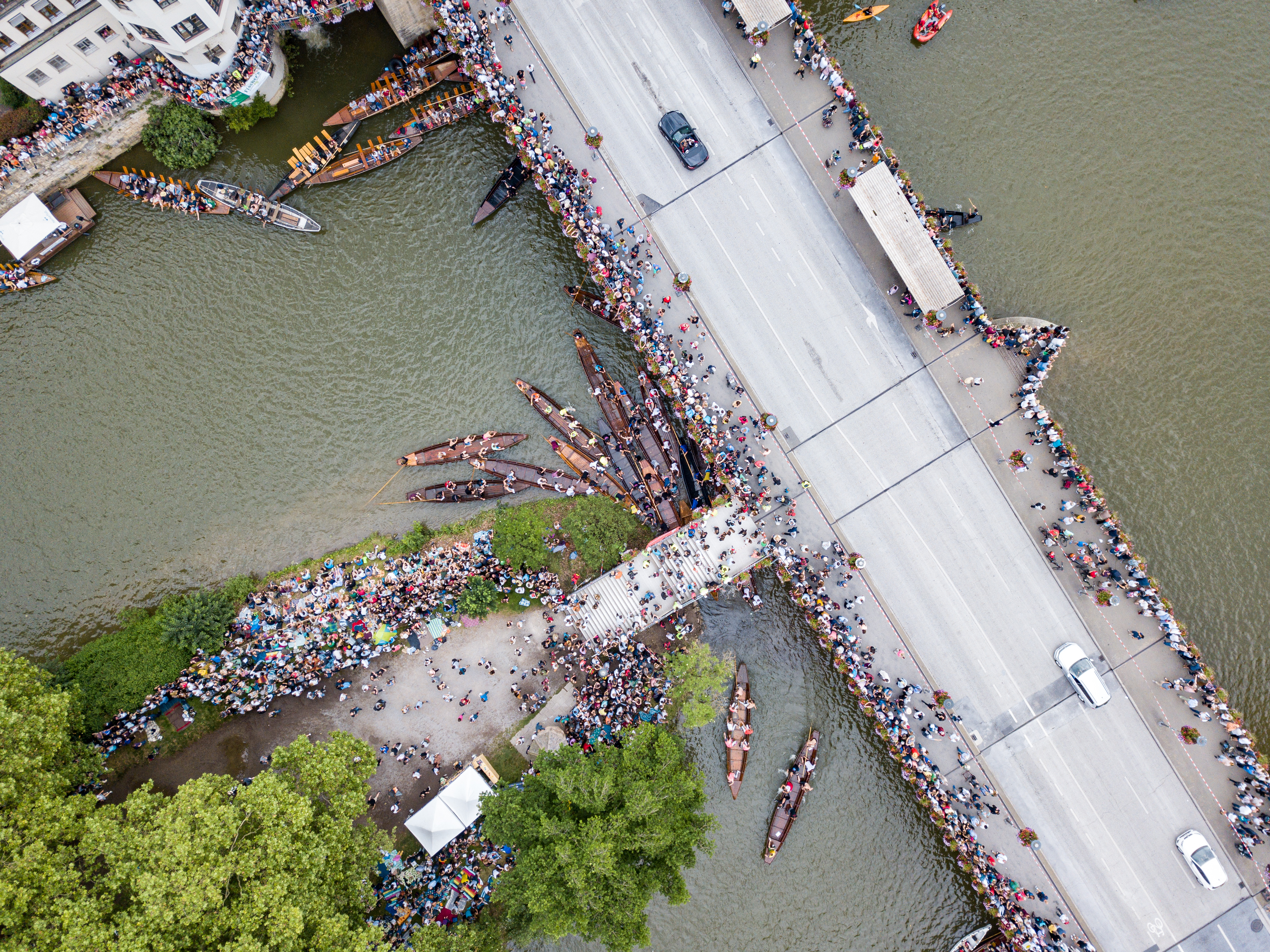 Stocherkahnrennen 2019 034